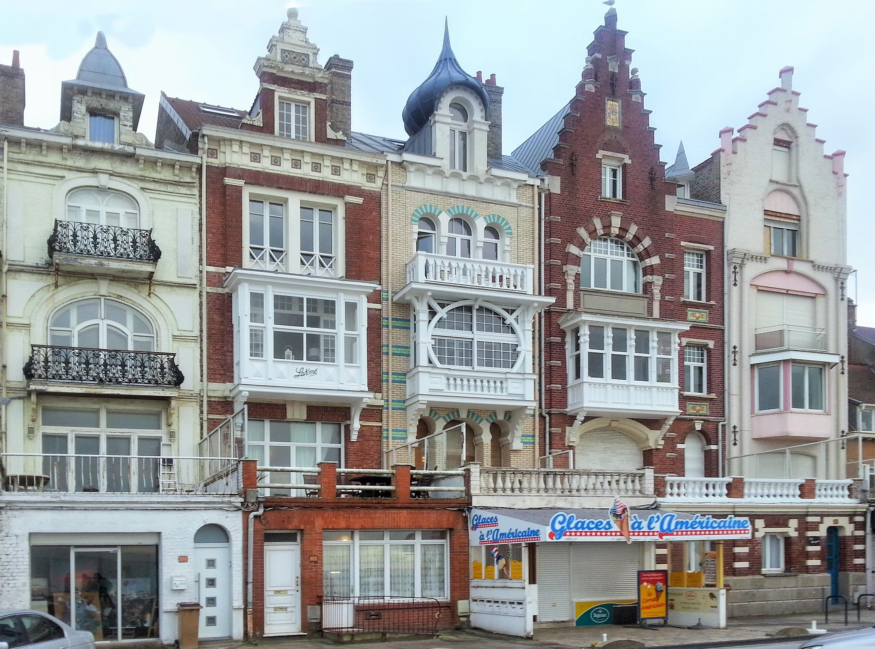 Plage de Malo-les-Bains , sur le GR120.- Nord), Nord-Pas-de-Calais-Picardie France.